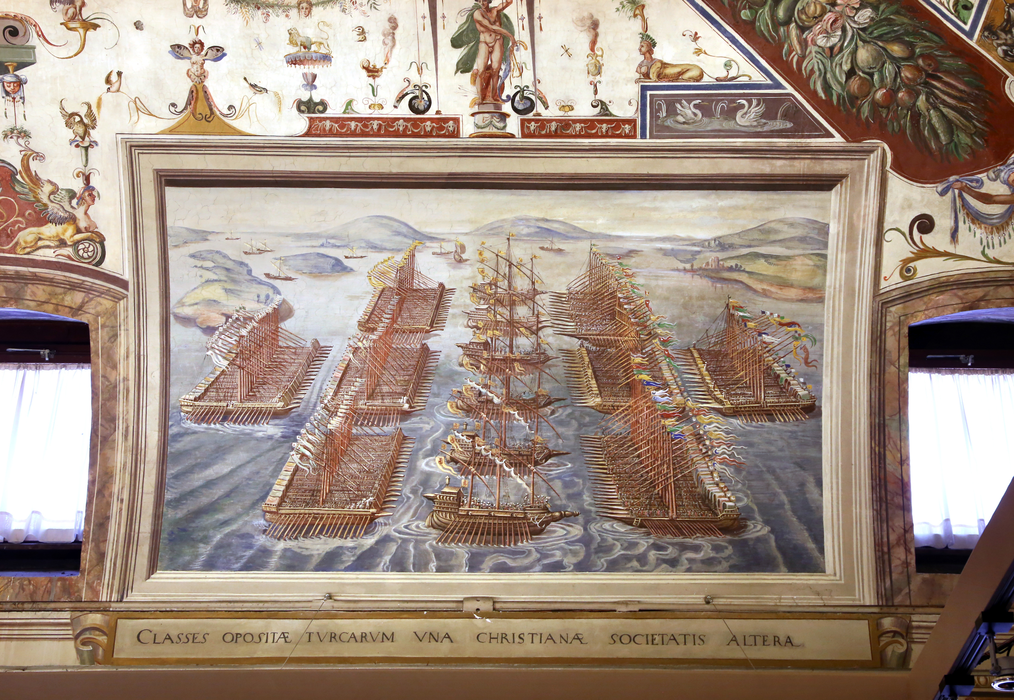 Palazzo Spada (Terni) - Sala di Fetonte This is a photo of a monument which is part of cultural heritage of Italy.